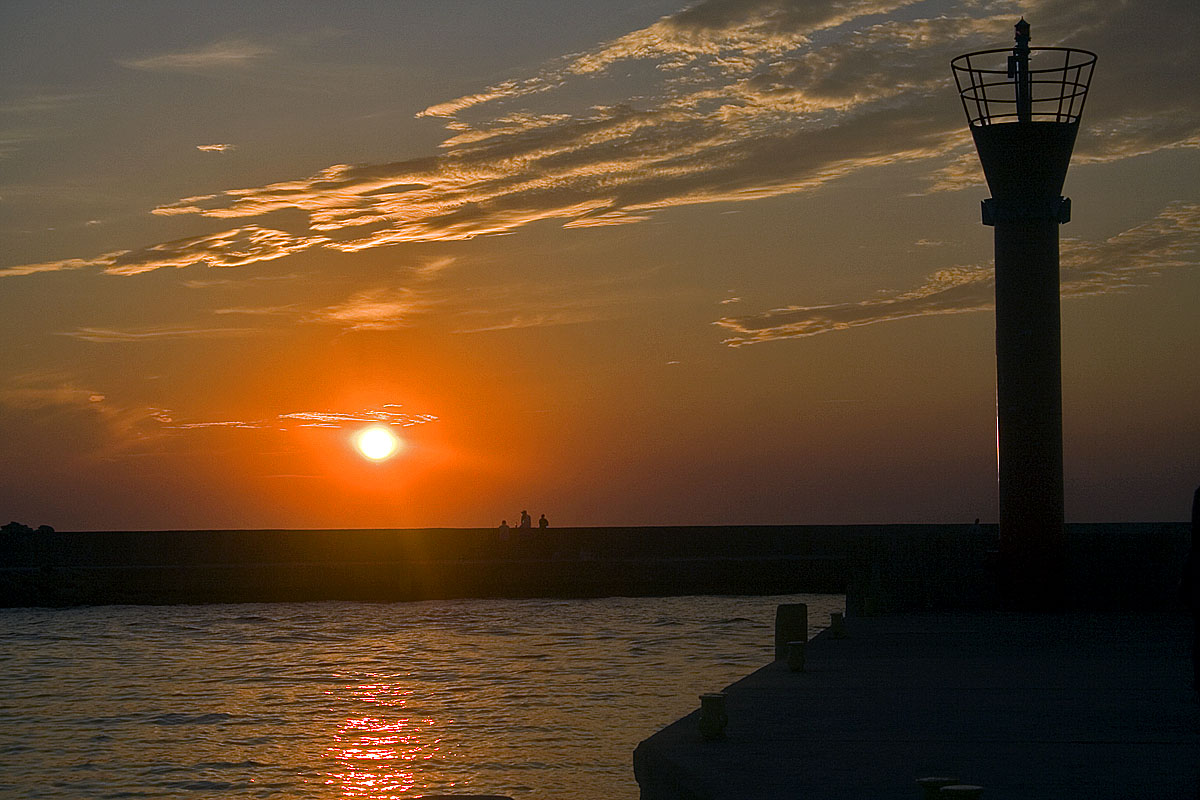 Mrzeżyno - wejście do portu.